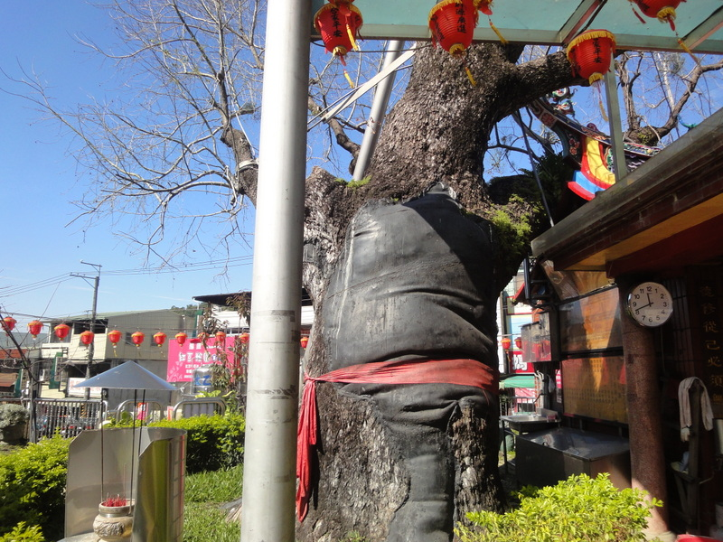 中文（台灣）: 大坑圓環楓香樹